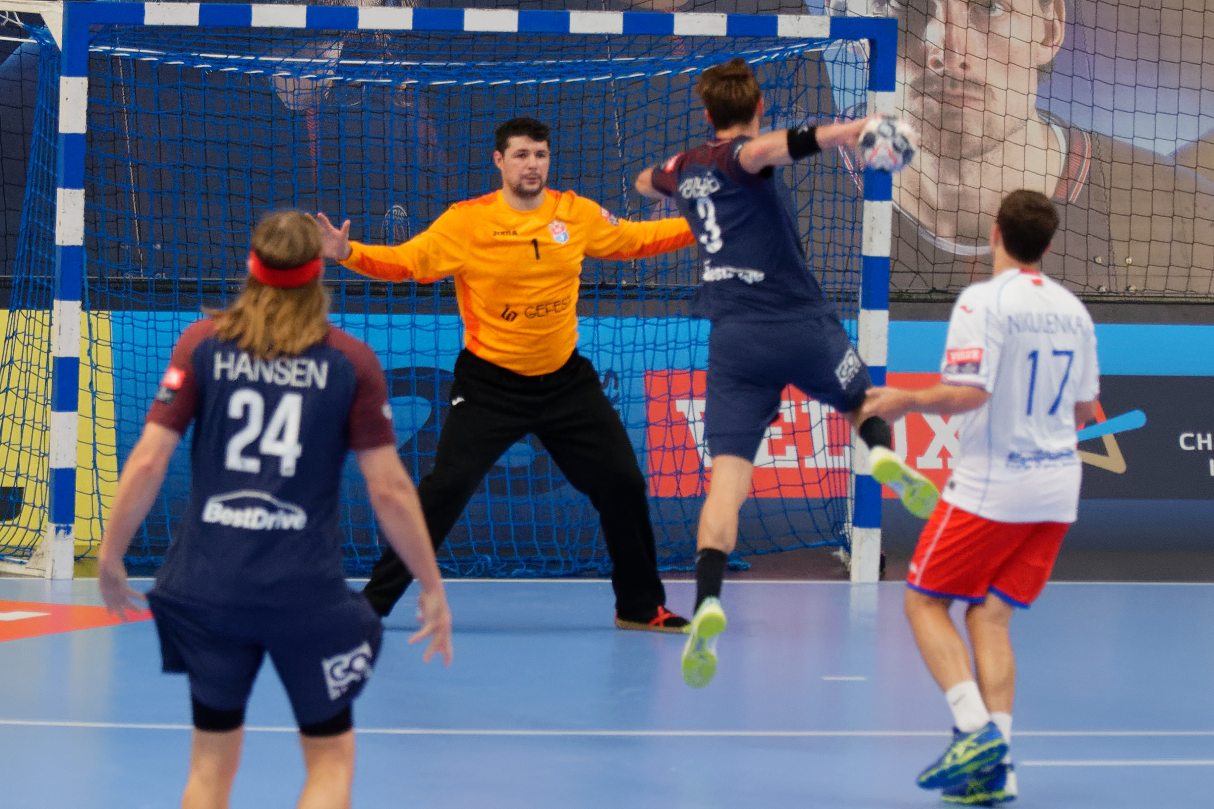 Rencontre de phase de groupe de la ligue des champions 2017/18 entre le PSG et Meshkov Brest A Coubertin le 24 septembre 2017.